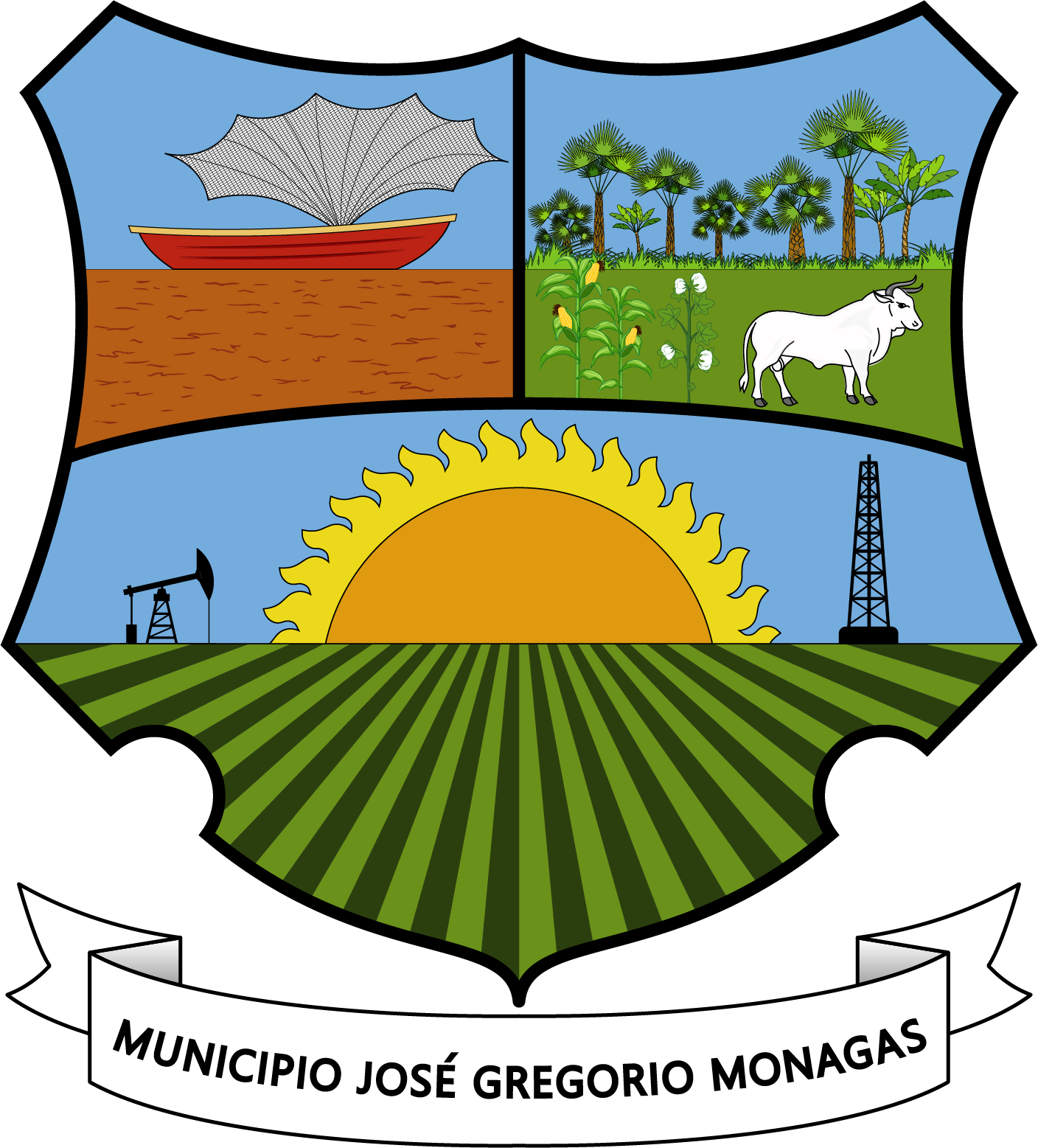 Escudo del Municipio José Gregorio Monagas, Estado Anzoátegui.